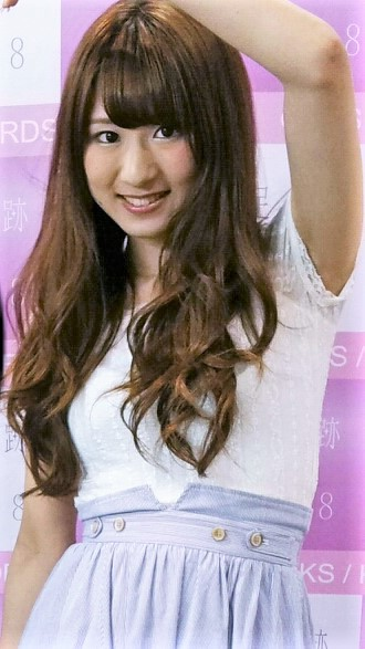 (20140503) 次の足跡 샤메회 in 오사카 (Jurina Matsui)